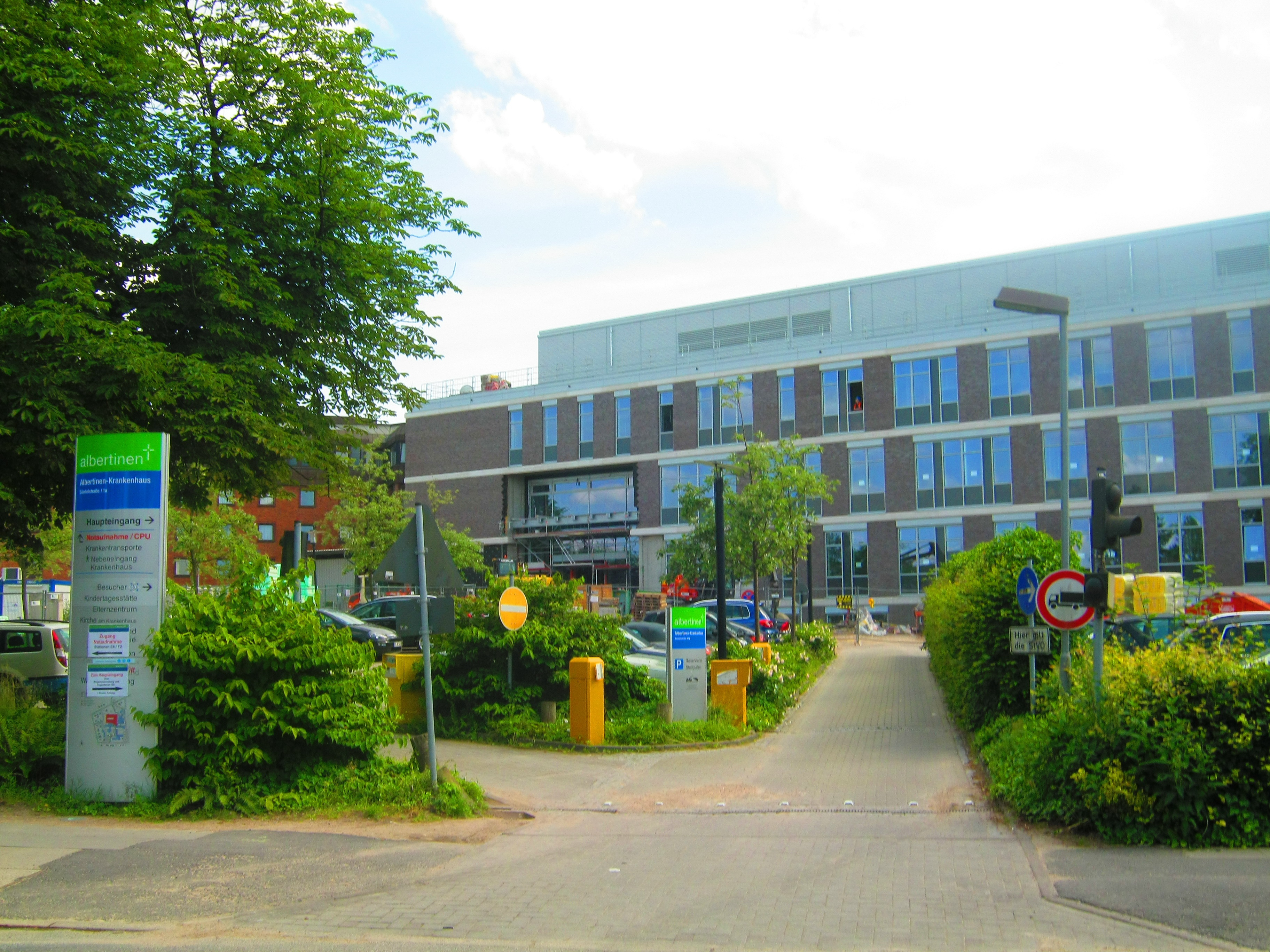 Albertinen-Krankenhaus Süntelstraße in Hamburg-Schnelsen.